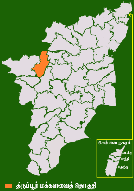 தமிழக வரைபடத்தில் உள்ள திருப்பூர் மக்களவைத் தொகுதி